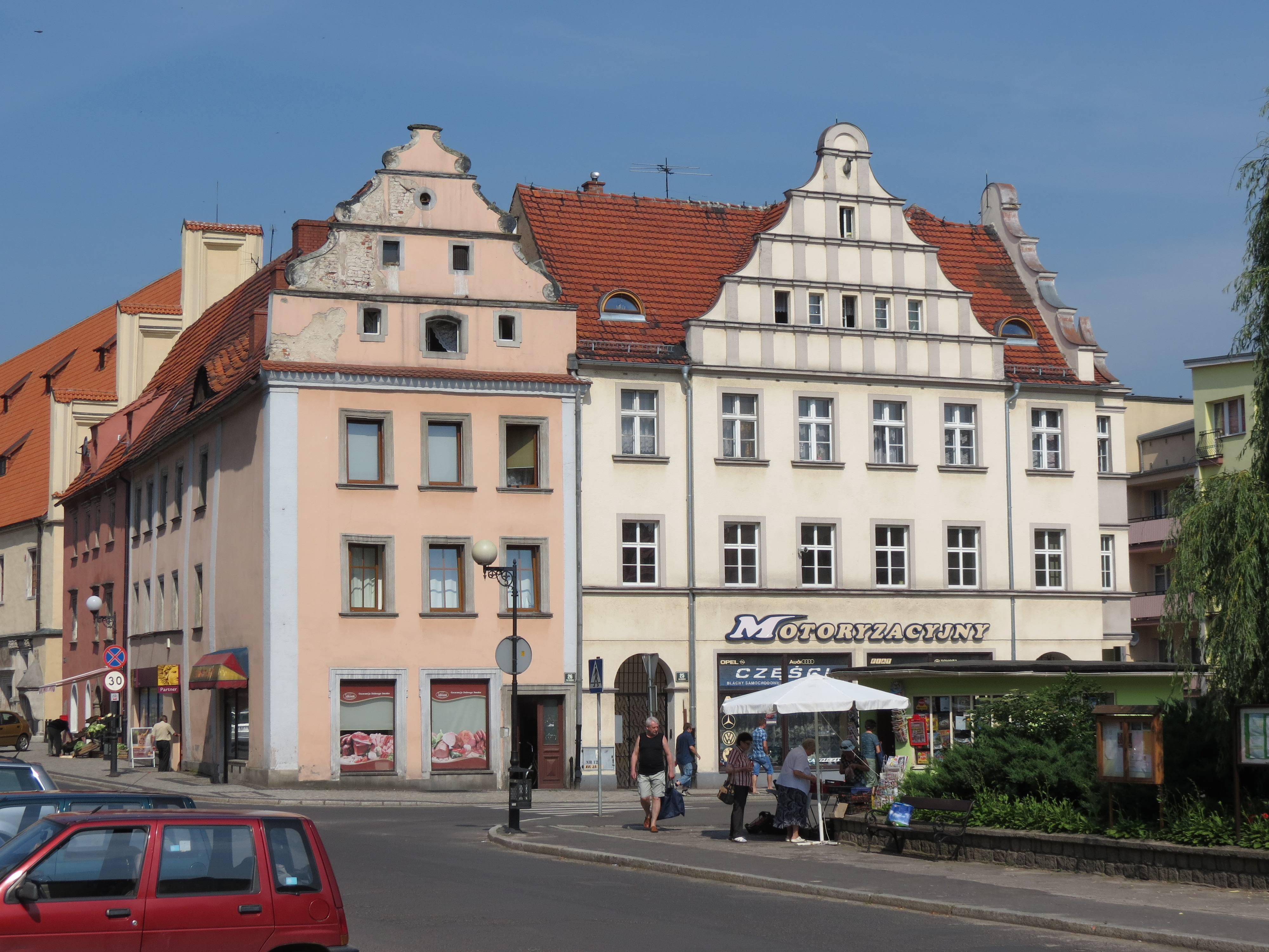 Lwówek Śląski, zabudowa Rynku (blok Ratuszowy i pierzeje)